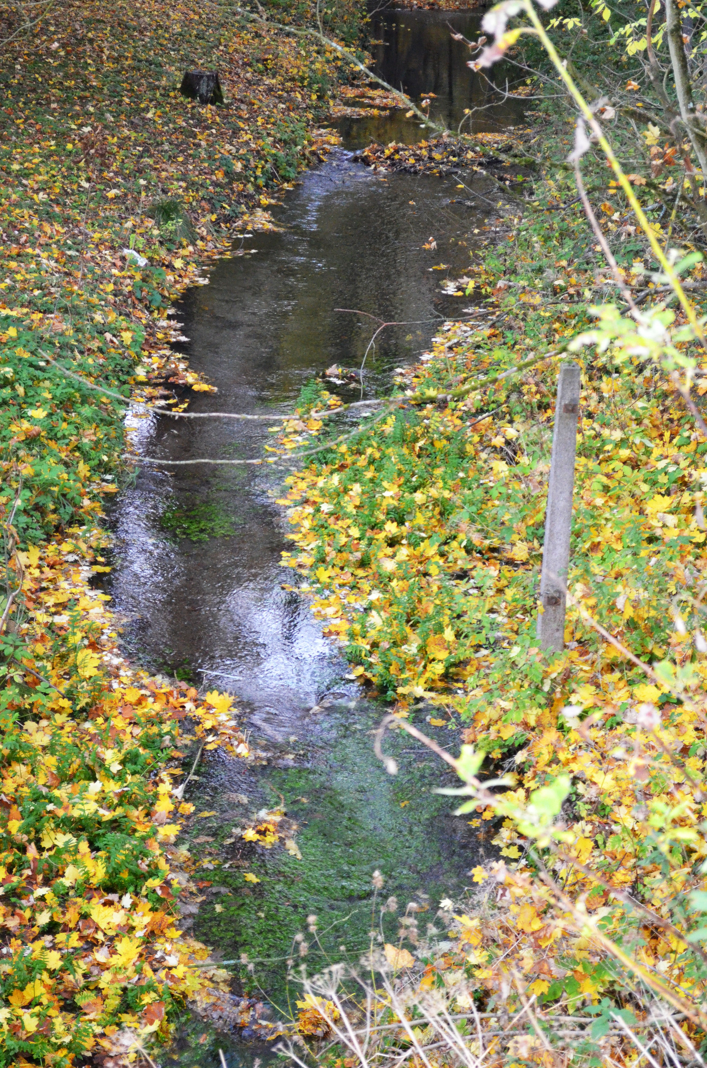 Alme, die Alme in der Nähe der Quelle 4